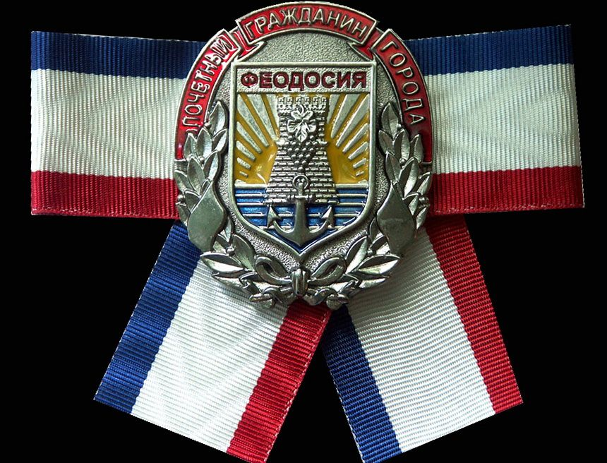 Нагрудный знак Почётного гражданина Феодосии, вручавшийся в 2000-е годы